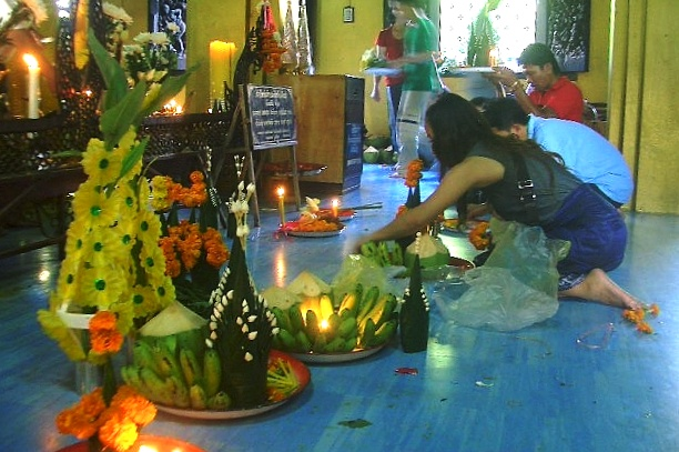 Photo by Ohsa Khayphet Wat Simuong ワット・シムアン ビエンチャン 1563年、セタティラート王がルアンパバーンからビエンチャンに遷都した後に、建立された寺院。建設時、柱を立てるための穴に妊娠した女性が神への生け贄としてささげられ、その上に石柱を立てたために、ここが聖なる土地となったという伝説が残る。そのため、女性の参拝者が非常に多い。